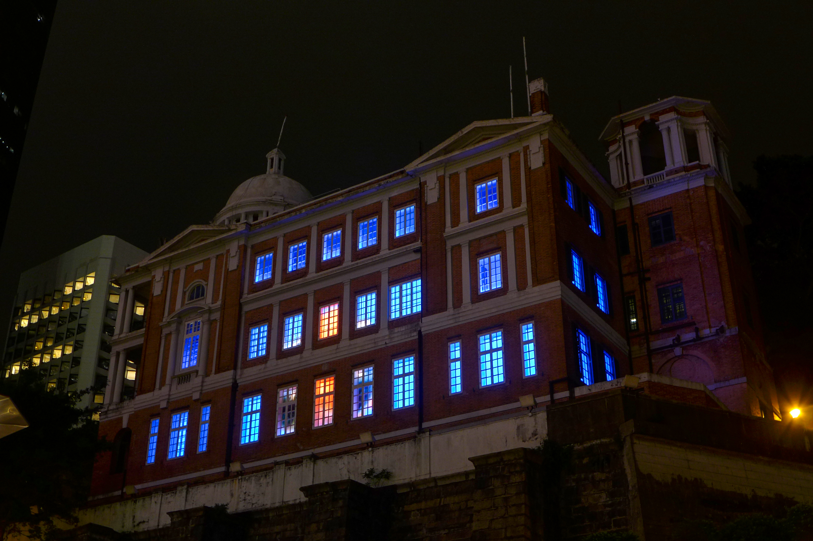 Former French Mission Building during lumiereshk